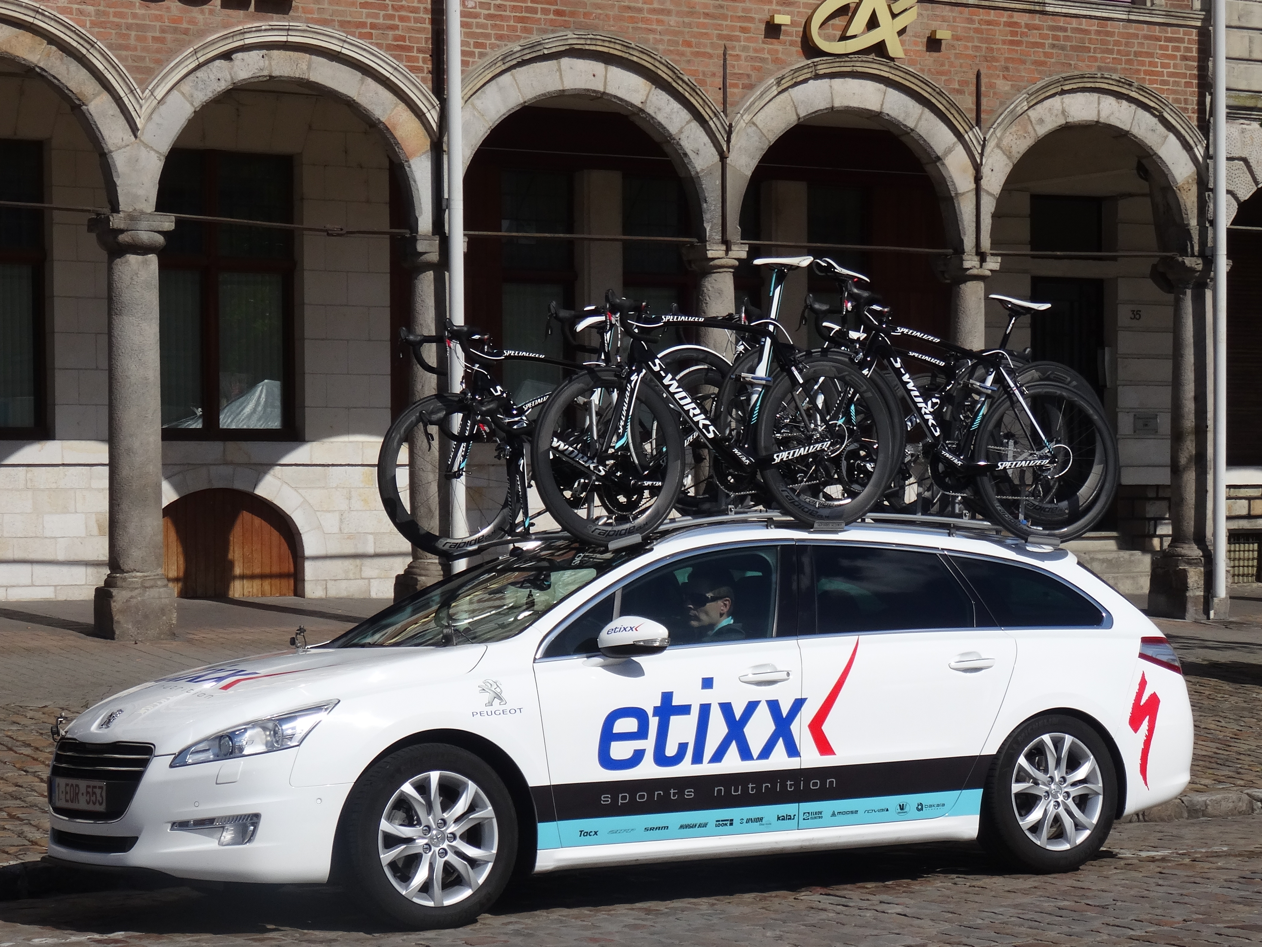 Reportage photographique réalisé le dimanche 25 mai 2014 à l'occasion du départ et de l'arrivée de la troisième étape du Paris-Arras Tour 2014 à Arras, Pas-de-Calais, Nord-Pas-de-Calais, France.